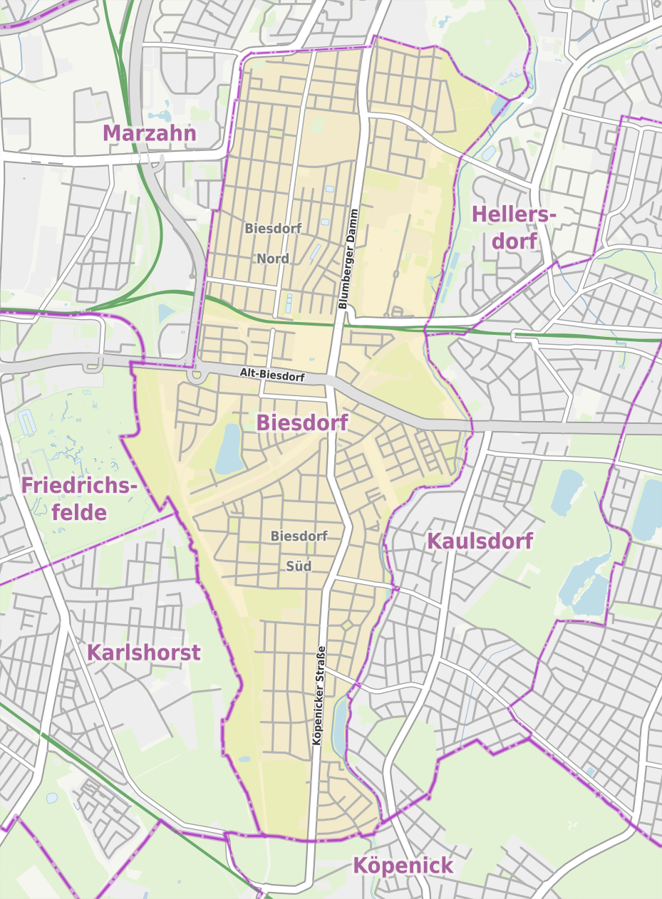 Übersichtskarte der Straßen und Ortslagen in Berlin-Biesdorf